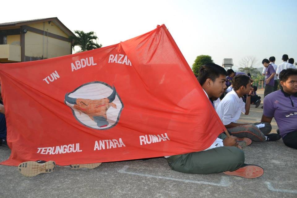 Rumah Merah SMK Undang Jelebu